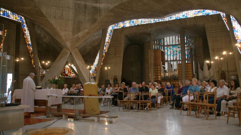 messe